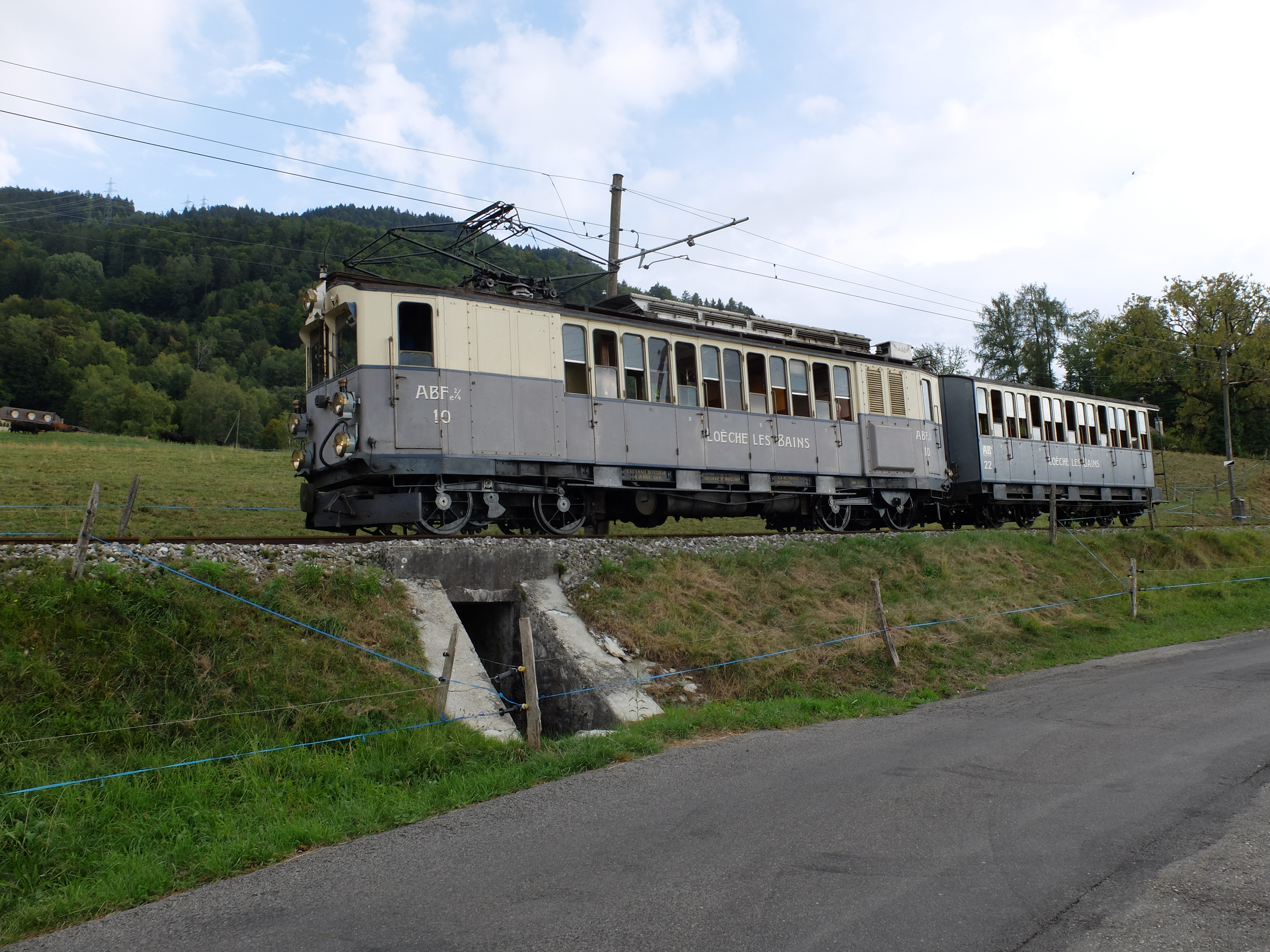 LLB 10 ( ABFe 4-4 ) und 22 (BC4) auf der Museumbahnstrecke Blonay-Chamby.